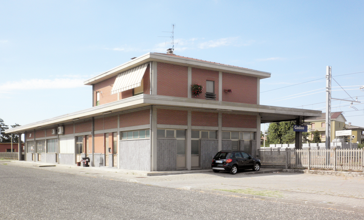 Stazione ferroviaria di Cadeo